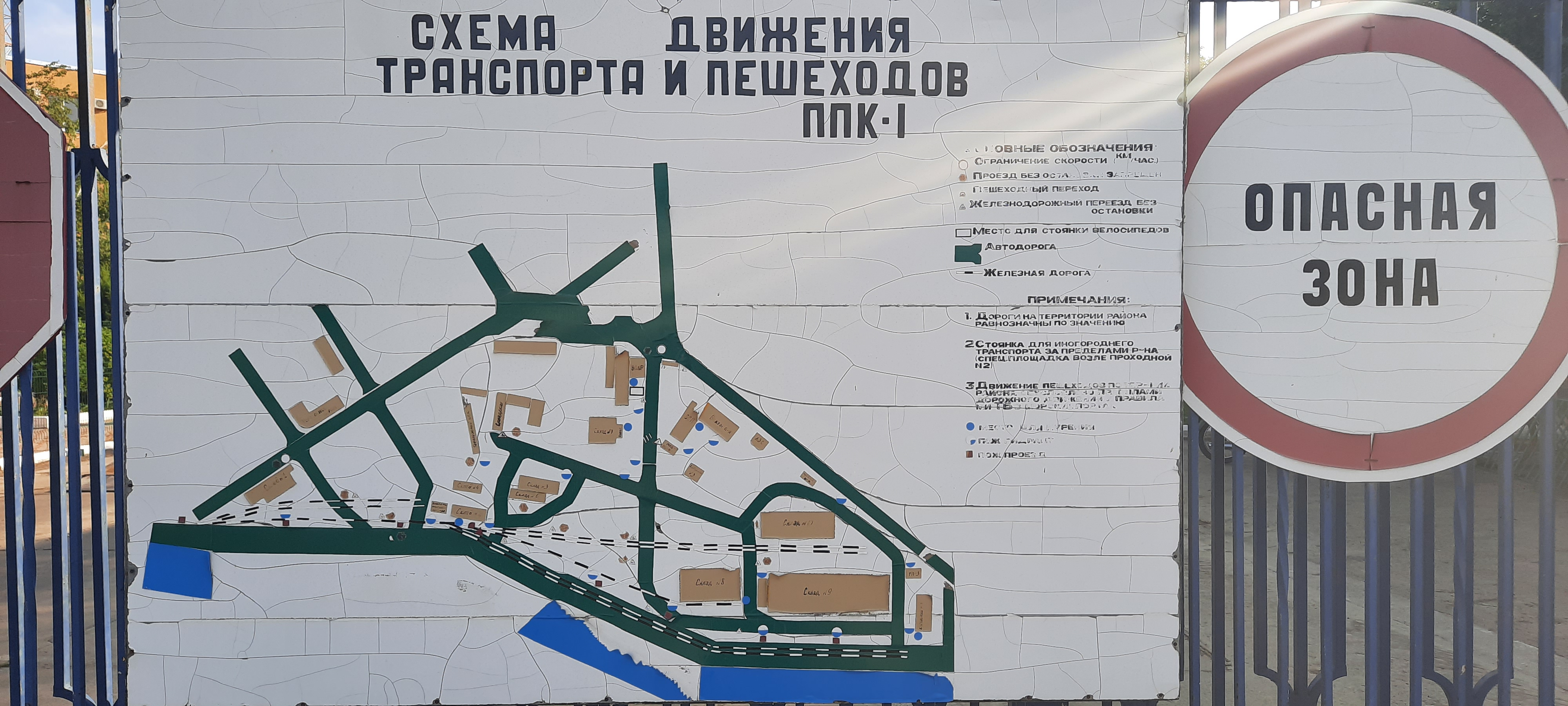 Схема движения транспорта и пешеходов ППК-1, расположенная возле КПП